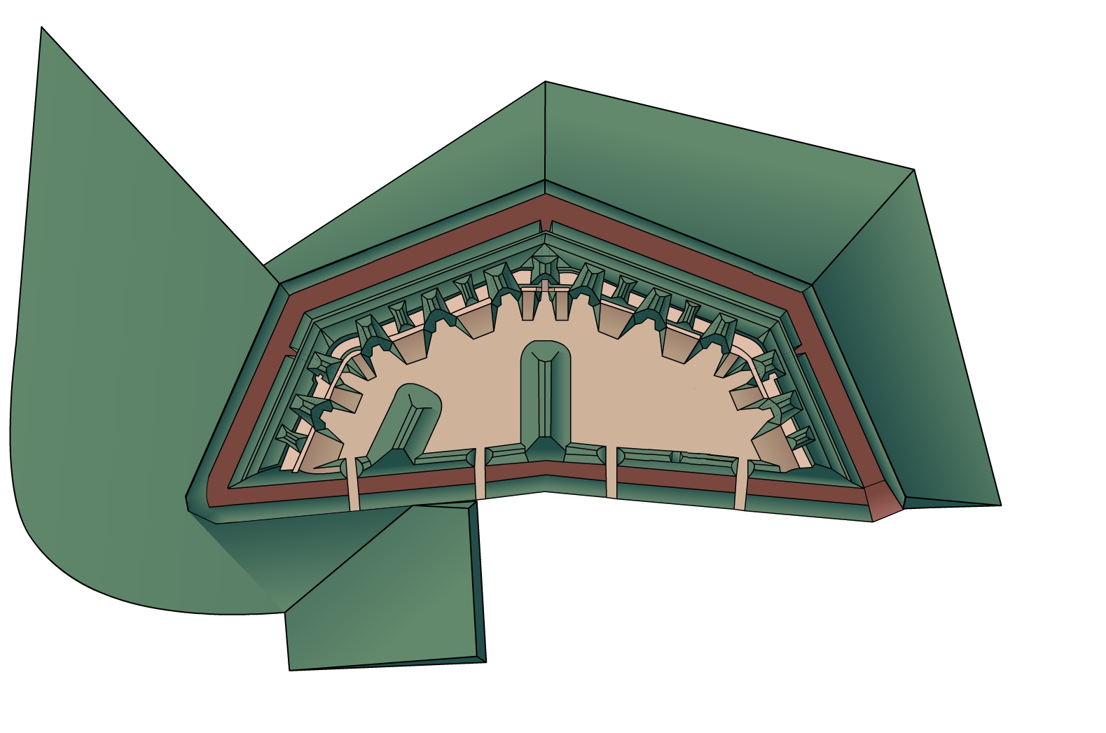 Земляной профиль 1-го форта Брест-Литовской крепости в цвете (1877).